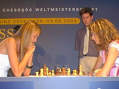 Carmen Kass blitz mit Antoaneta Stefanova, Chess Classic Mainz 2004.